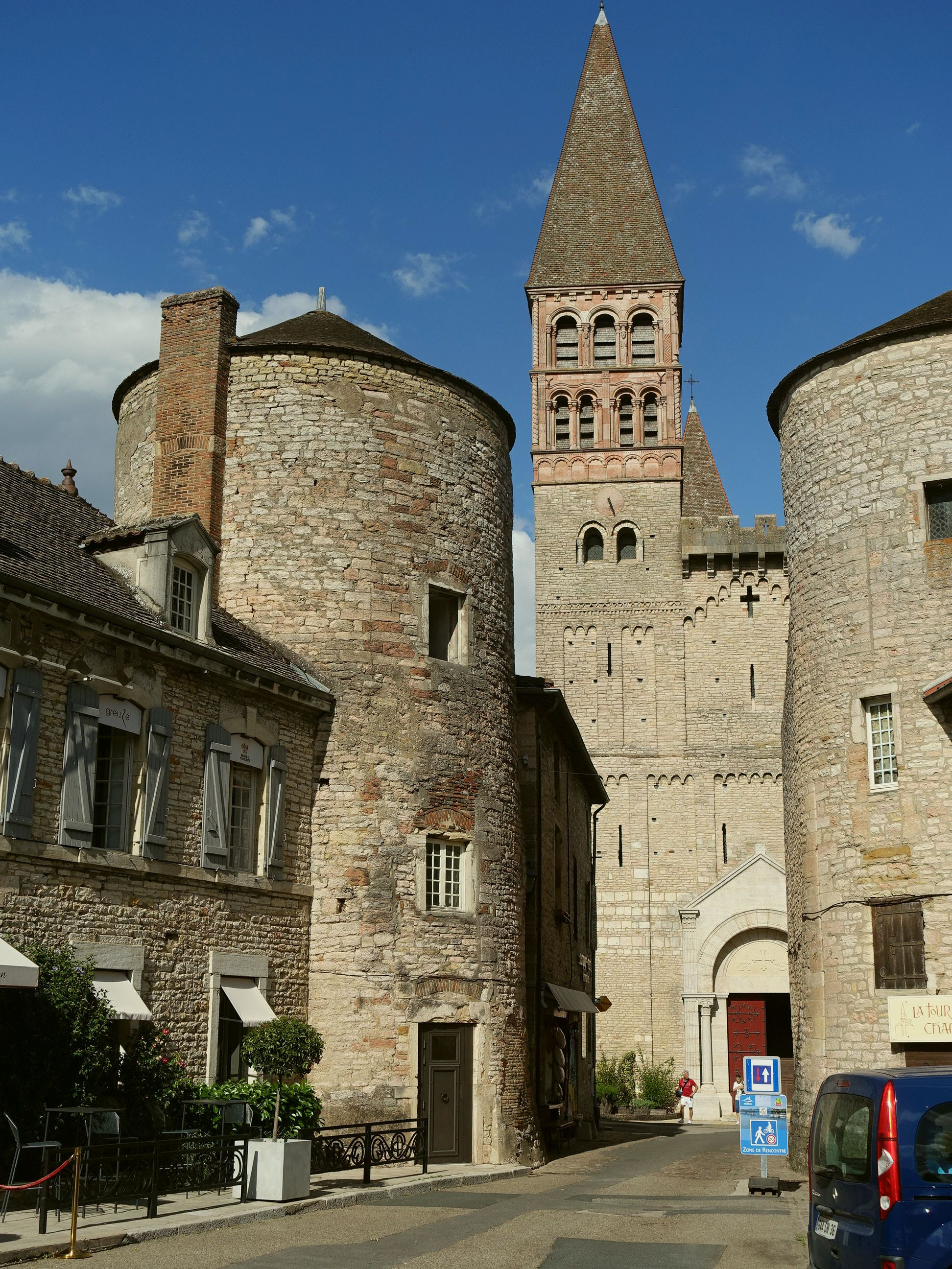 Bauliche Umgebung der Abteikirche Saint-Philibert in Tournus, Blick von Westen durch die Reste der Stadtbefestigung